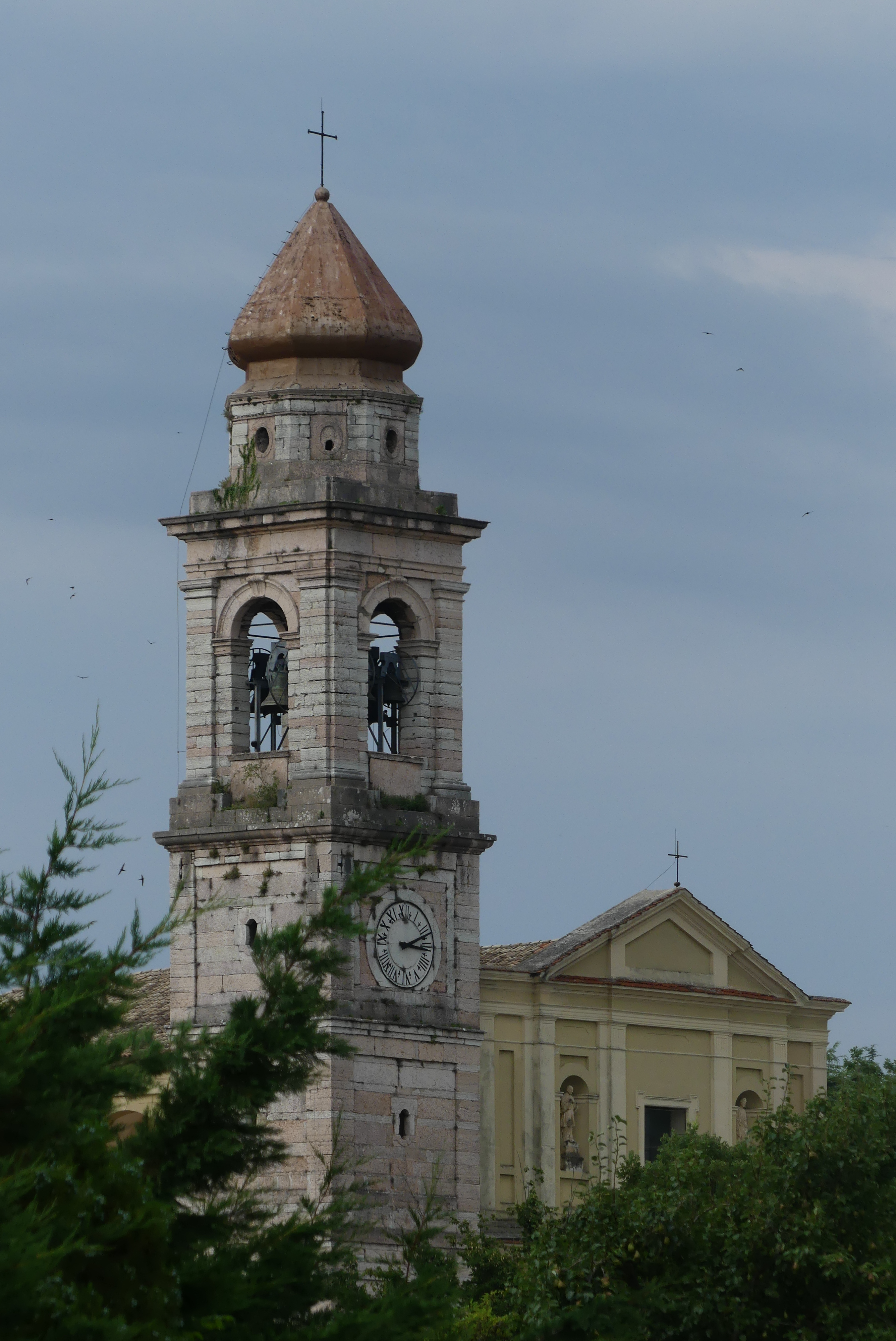 Das Bild zeigt den in Teilen im romanischen Stil erbauten Glockenturm, im Hintergrund die an die Klassik erinnernde Hauptfassade der Kirche jüngeren Datums. Der Ort San Zeno di Montagna liegt hoch über dem östlichen Ufer des Gardasees.